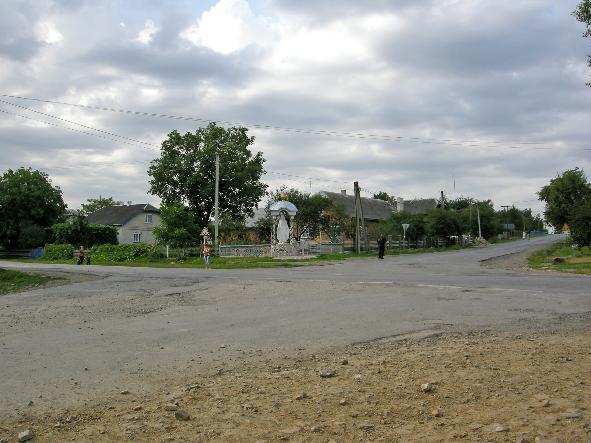 Роздоріжжя автошляхів Т-20-16 і Т-20-01 у Трибухівцях Бучацького району Тернопільської області.